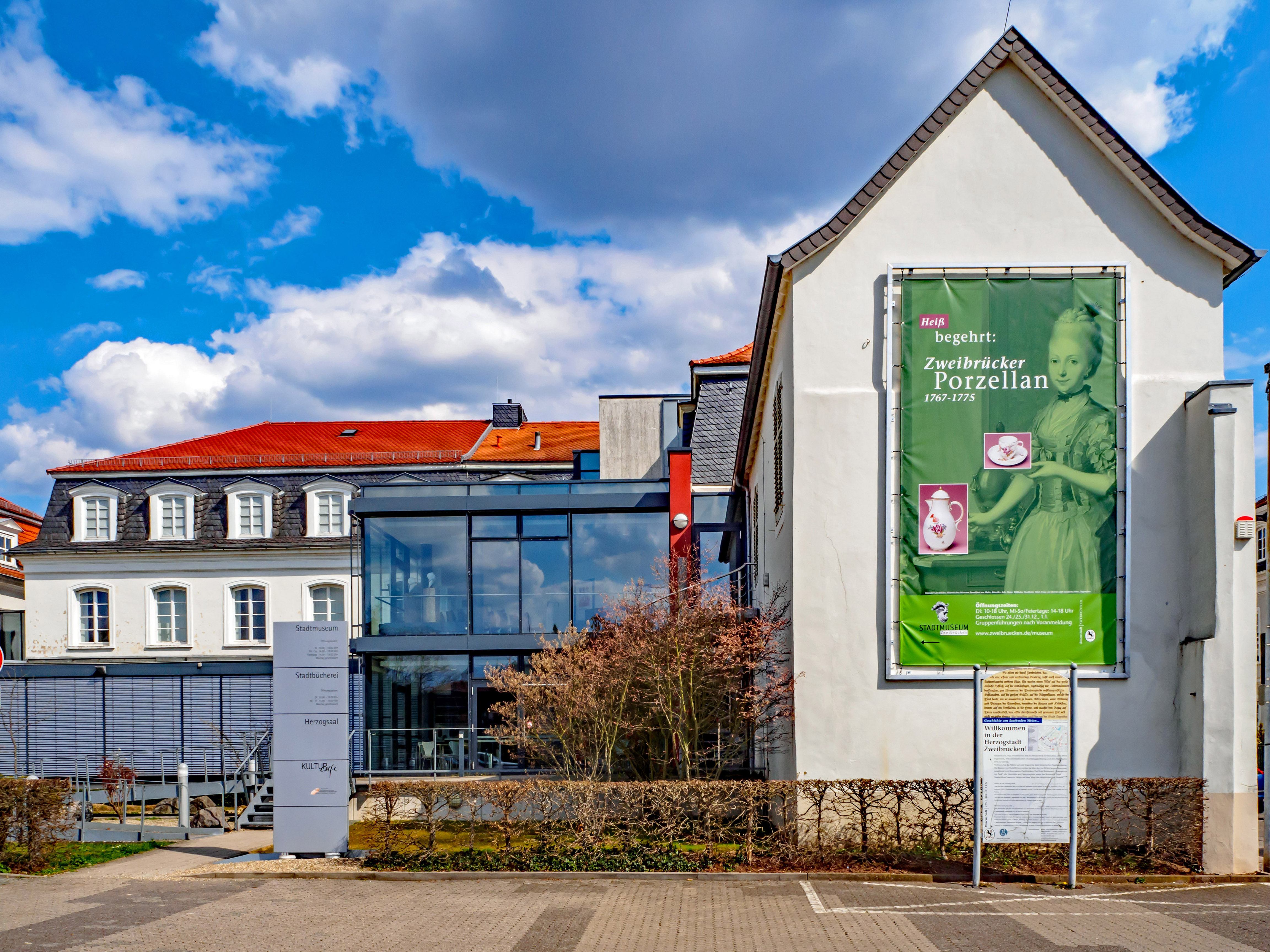 Anbau des Petrihauses in Zweibrücken: Barrierefreier Zugang, Blick auf das Café